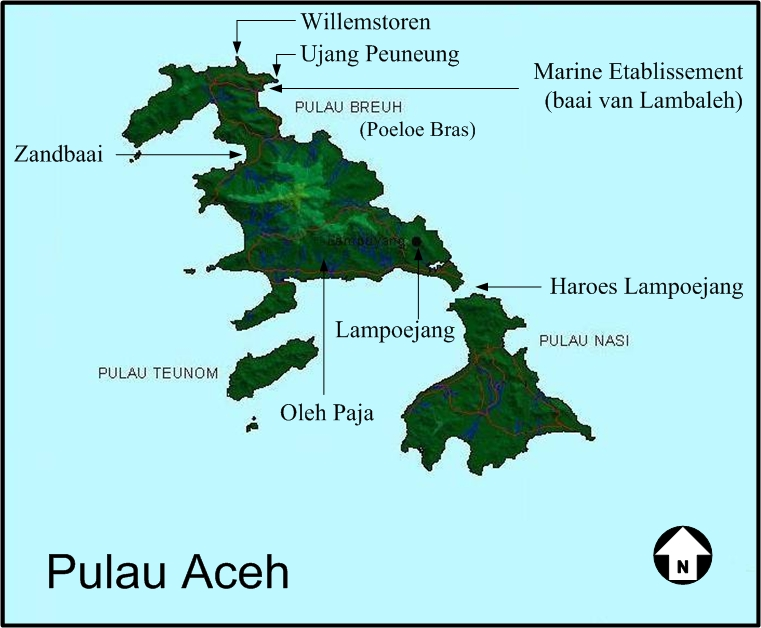 Pulau Atjeh, met als grootste eiland Pulau Brueh (of Poeloe Bras).